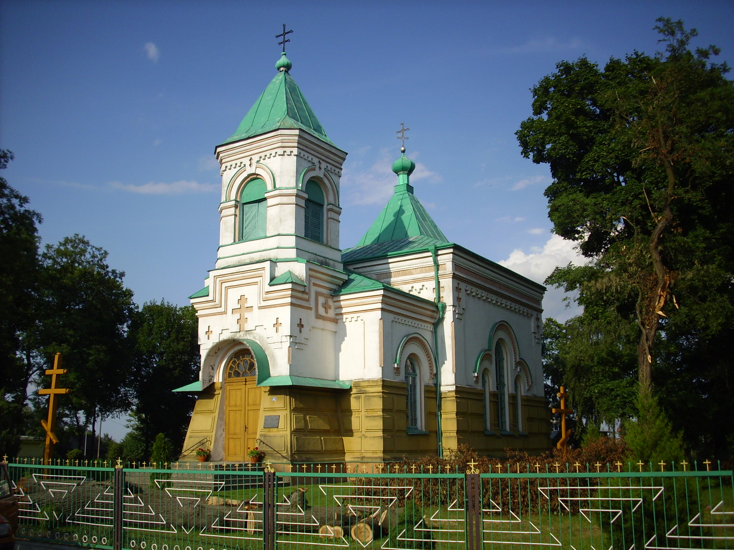 Kobylany - prawosławna cerkiew parafialna pw. Opieki Matki Bożej